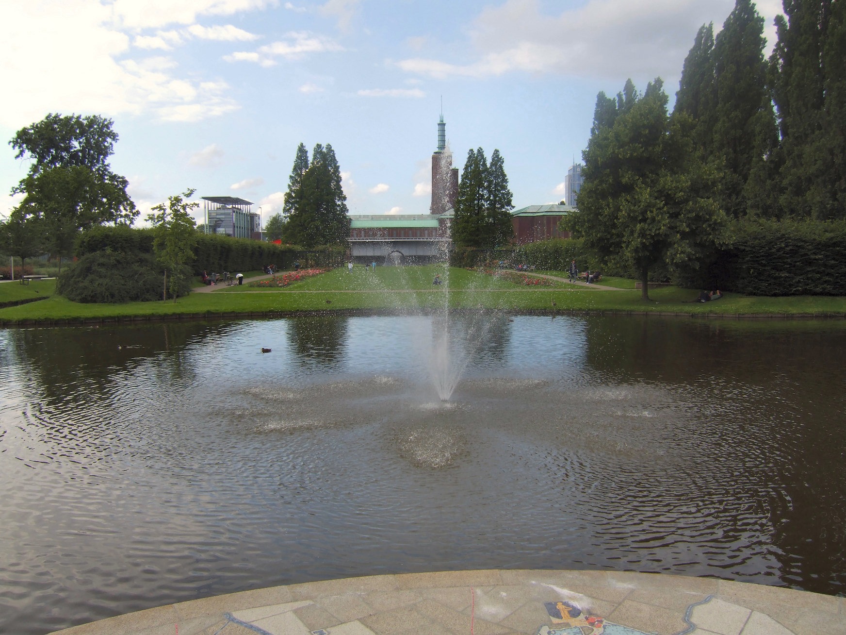 Museumpark in Rotterdam met museum Boymans Van Beuningen